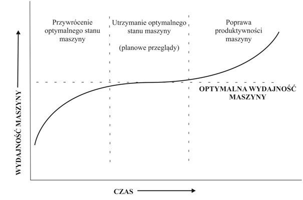 Wzrost wykorzystania efektywności maszyn z TPM